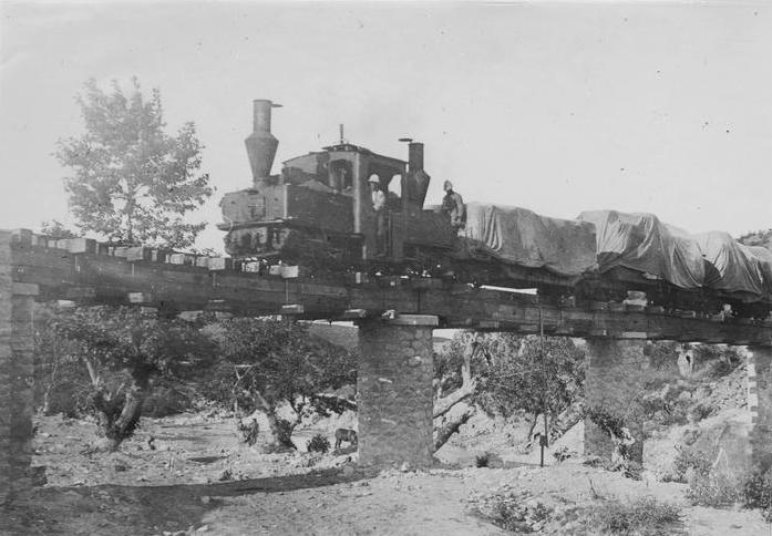 reportage photographique de l'armée françqise.